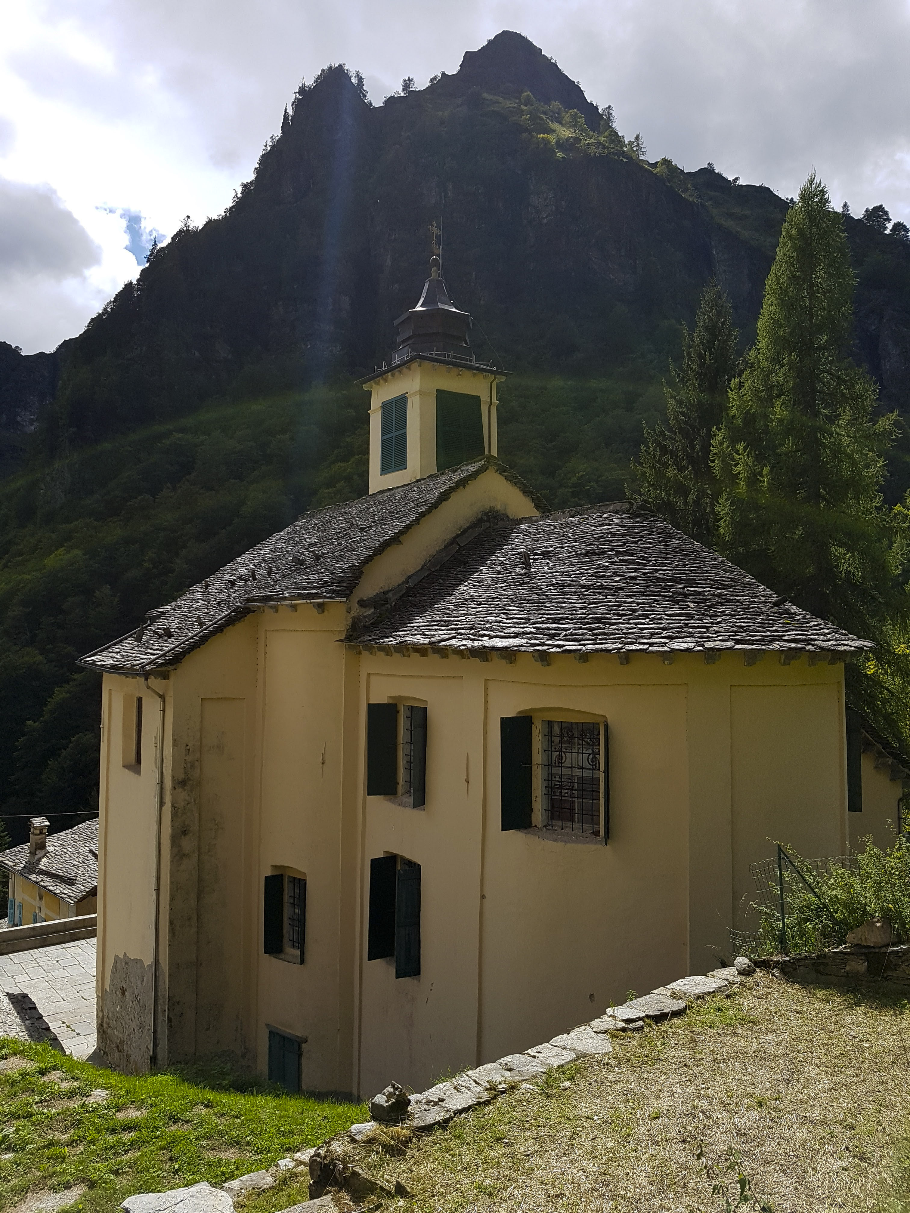 Abside chiesa San Giovanni Battista a Campello Monti ripresa da Via Mulattiera Lago Capezzone